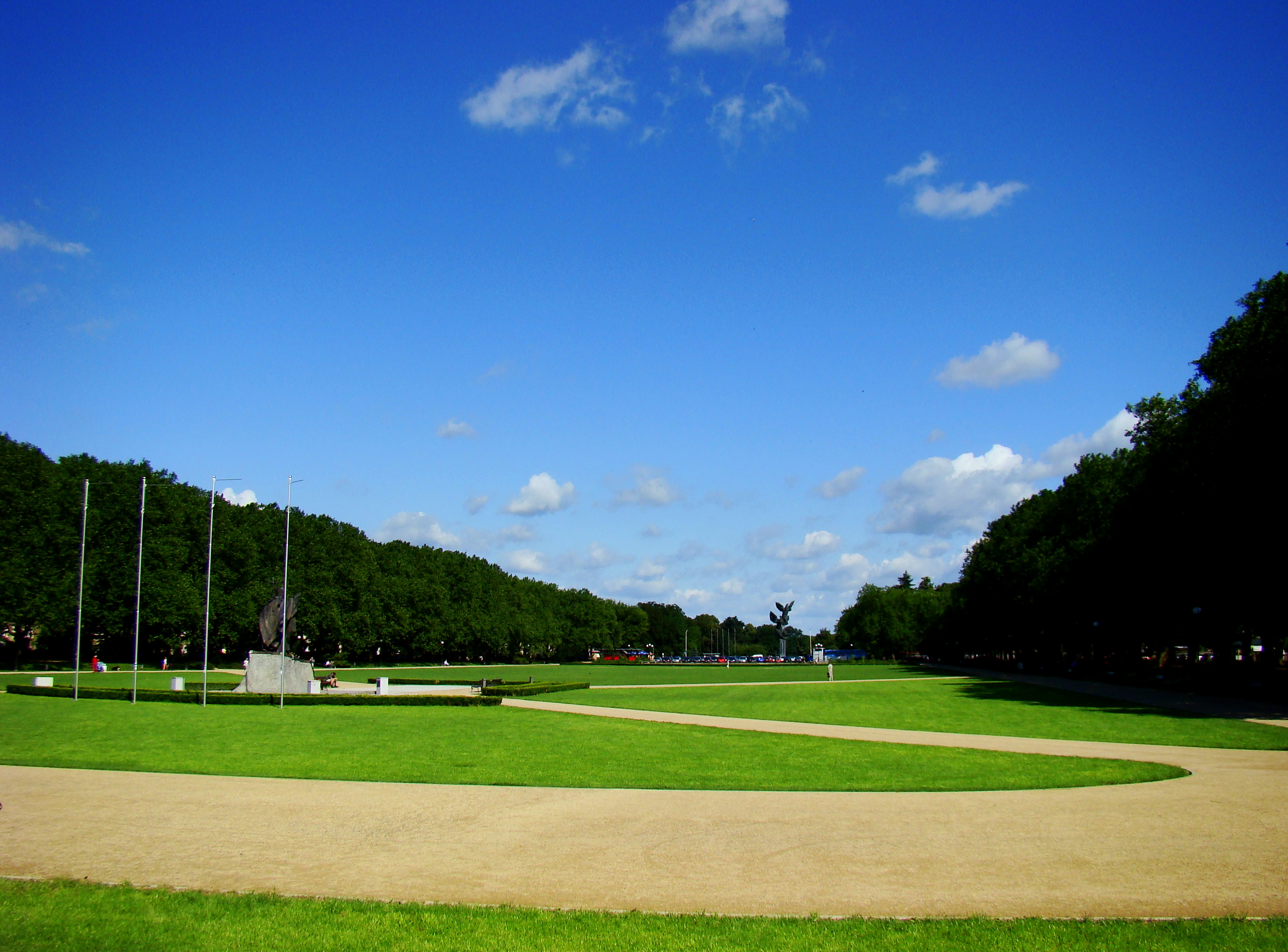 Plac Jasne Błonia im. Jana Pawła II, Szczecin, Polska